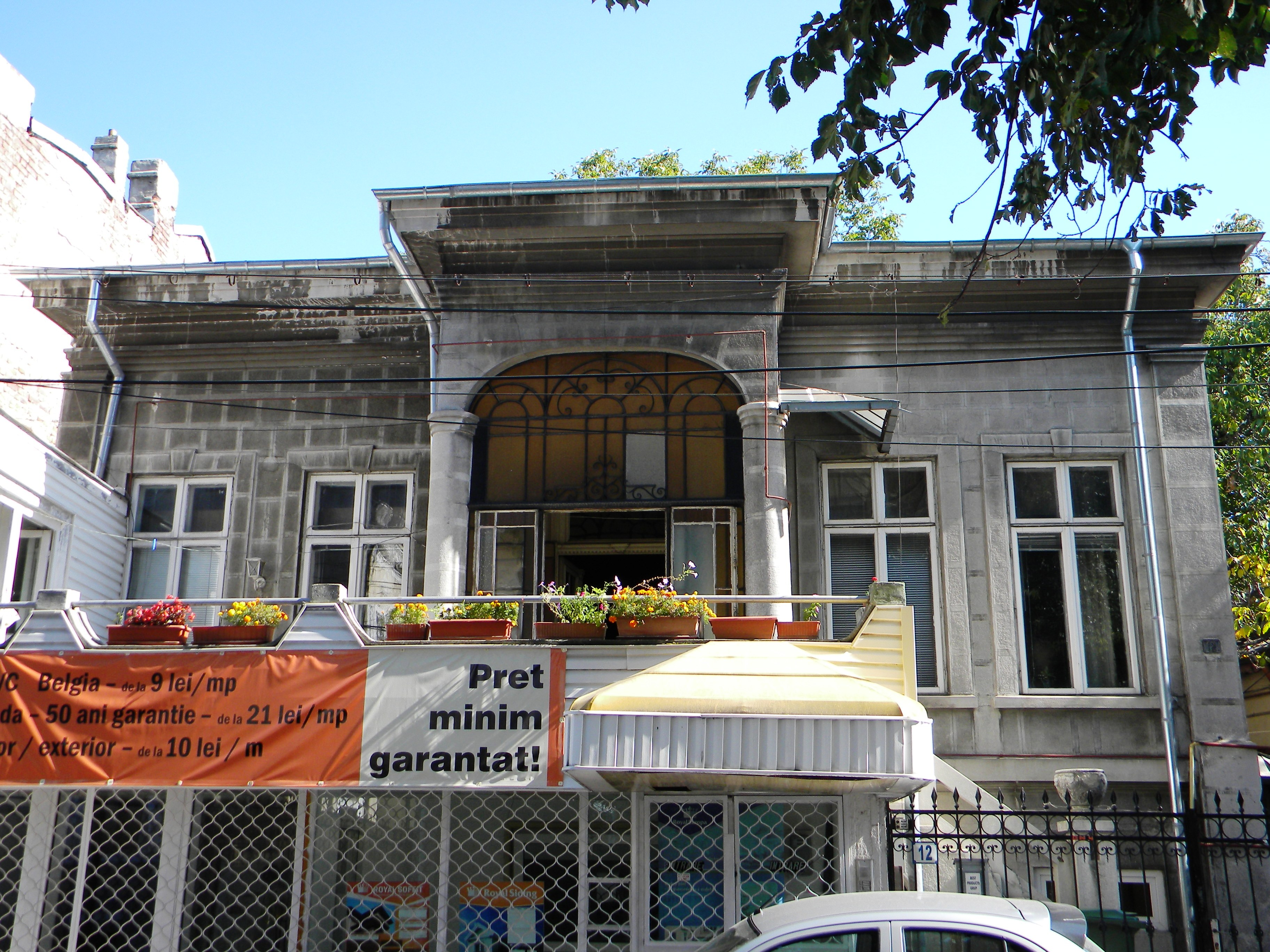 Bucuresti, Romania, Casa pe Str. Iulia Hasdeu nr. 12, sect. 1